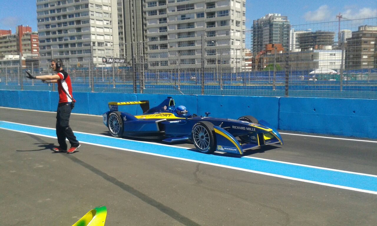 aaaaa